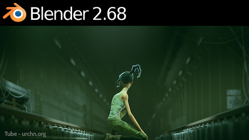 Blender 2.68 Splash Blender Foundation - Blender